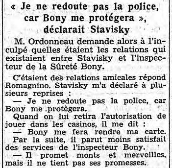 La presse titre à la une sur les accusations de Romagnino, l'un des complices de Stavisky, qui met en cause Pierre Bonny, L'Écho de Paris, 28 juin 1934.